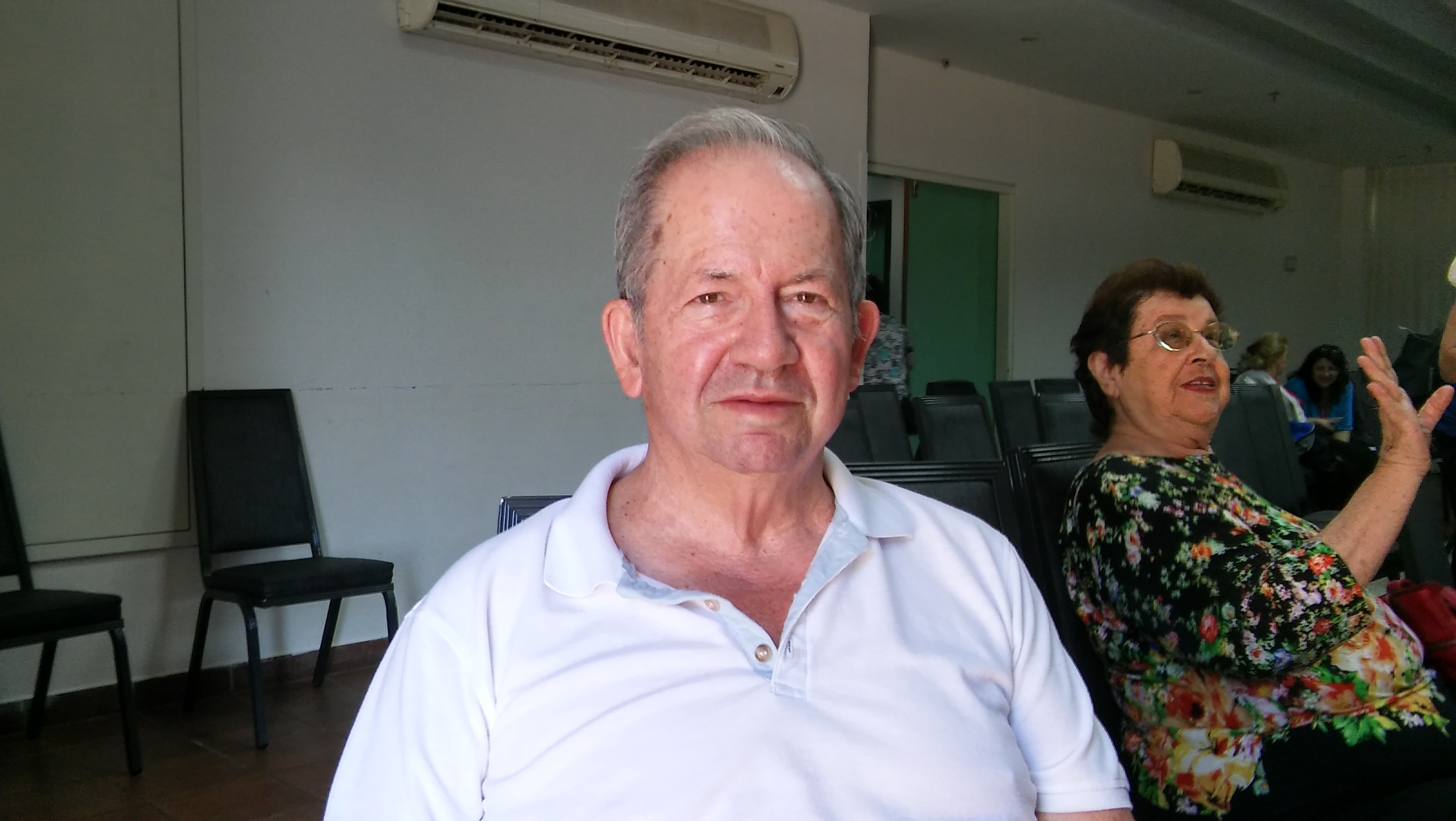 יחיאל לקט 2016